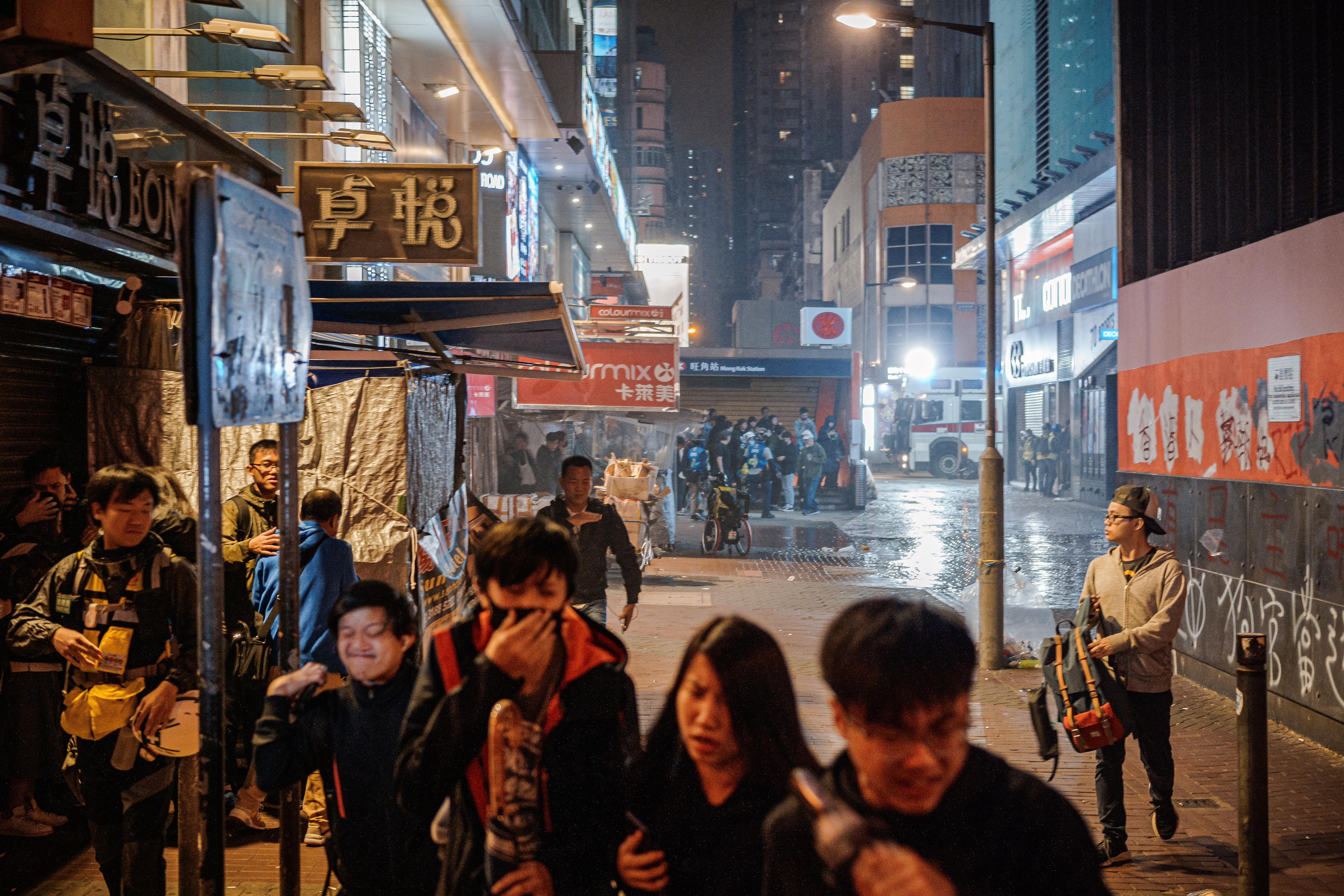 SDIM0320